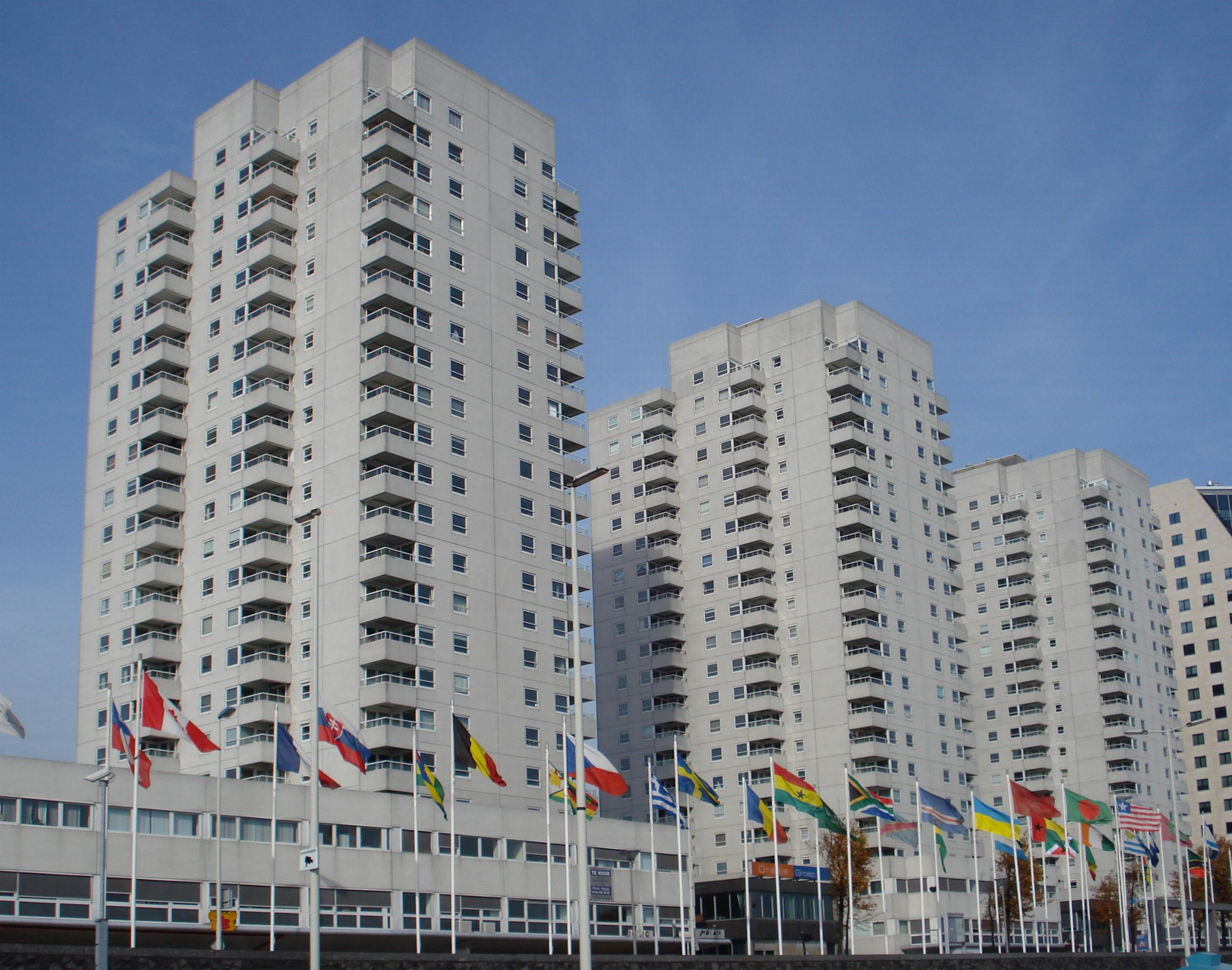 Rotterdam, Boompjes. Drie woontorens.